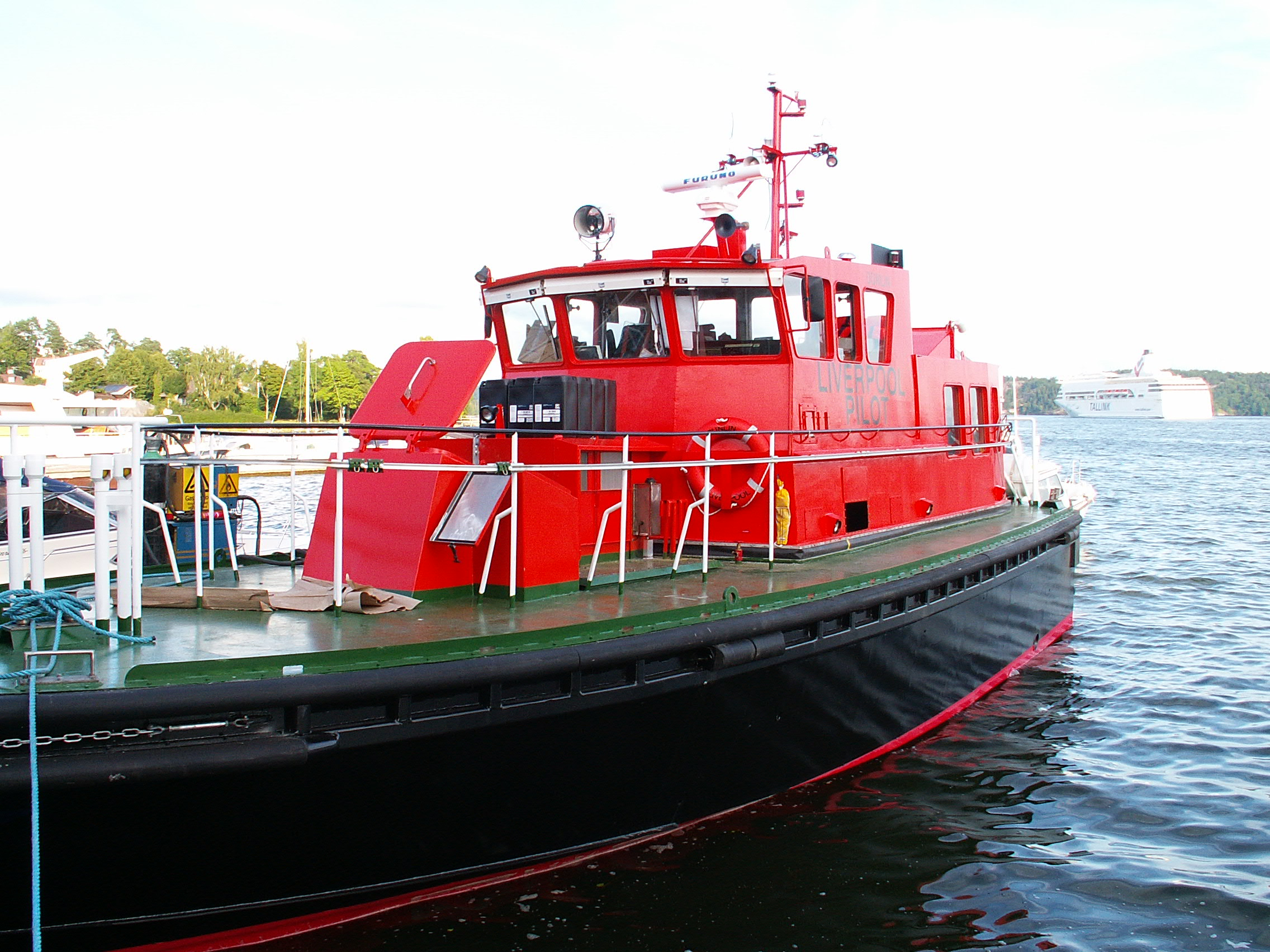 Boghammar Marin Pilotboat